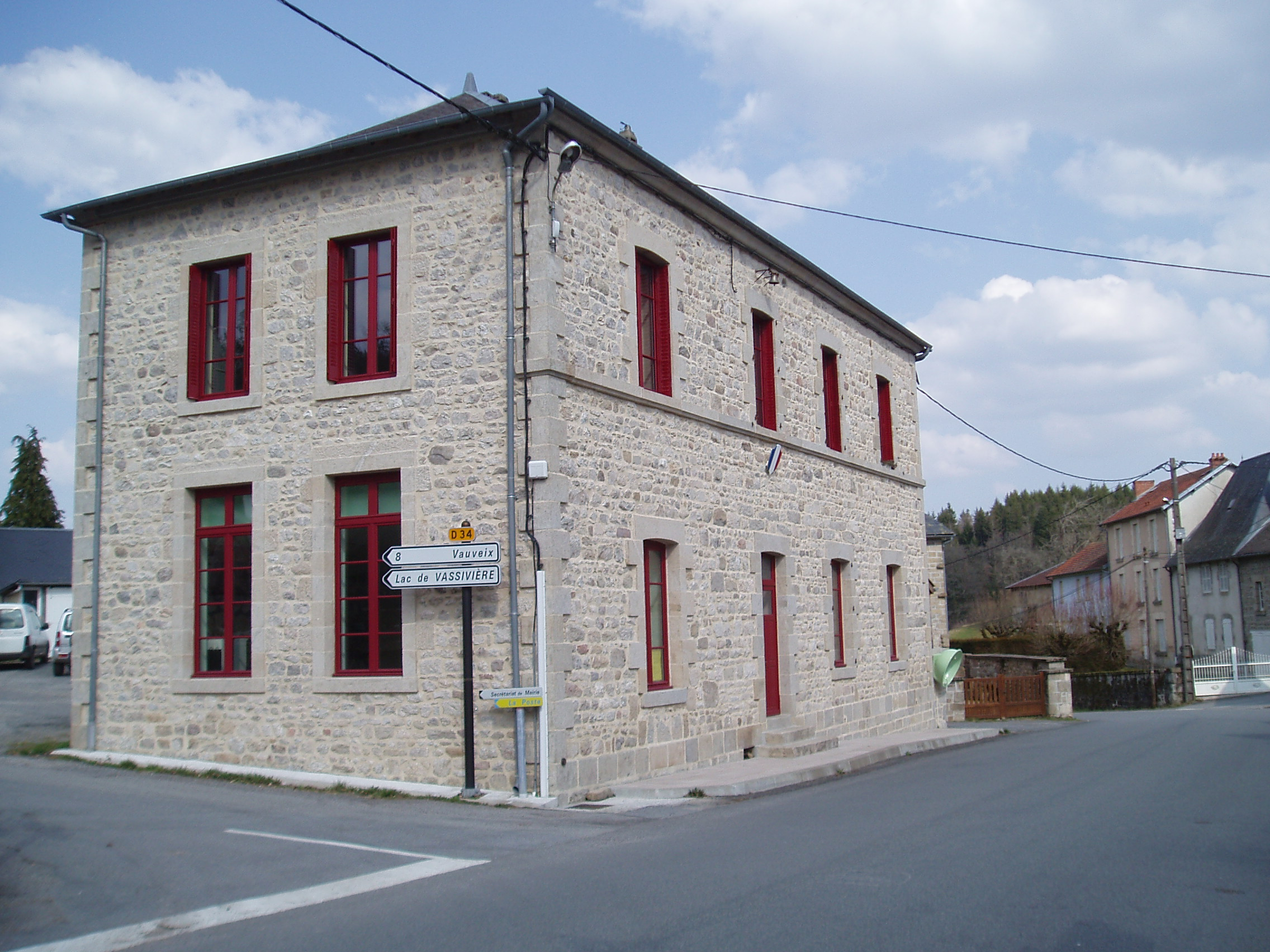 Marie